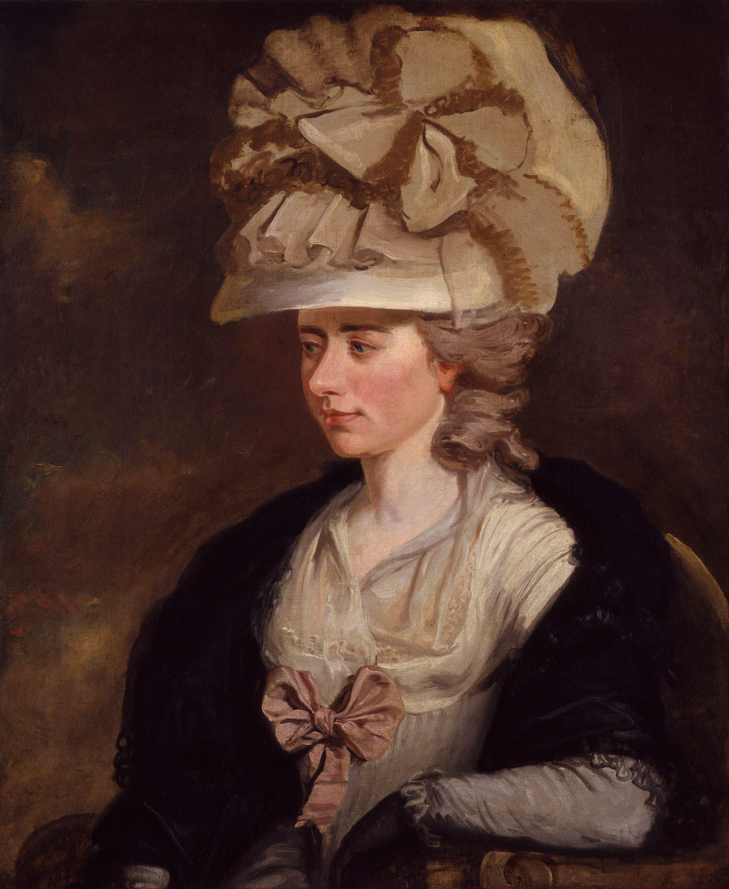 Portrait of future femme du général Alexandre d'Arblay (elle n'épouse cet émigré français qu'en 1793), Frances, alias 'Fanny' Burney (1752-1840), British writer, par son frère.